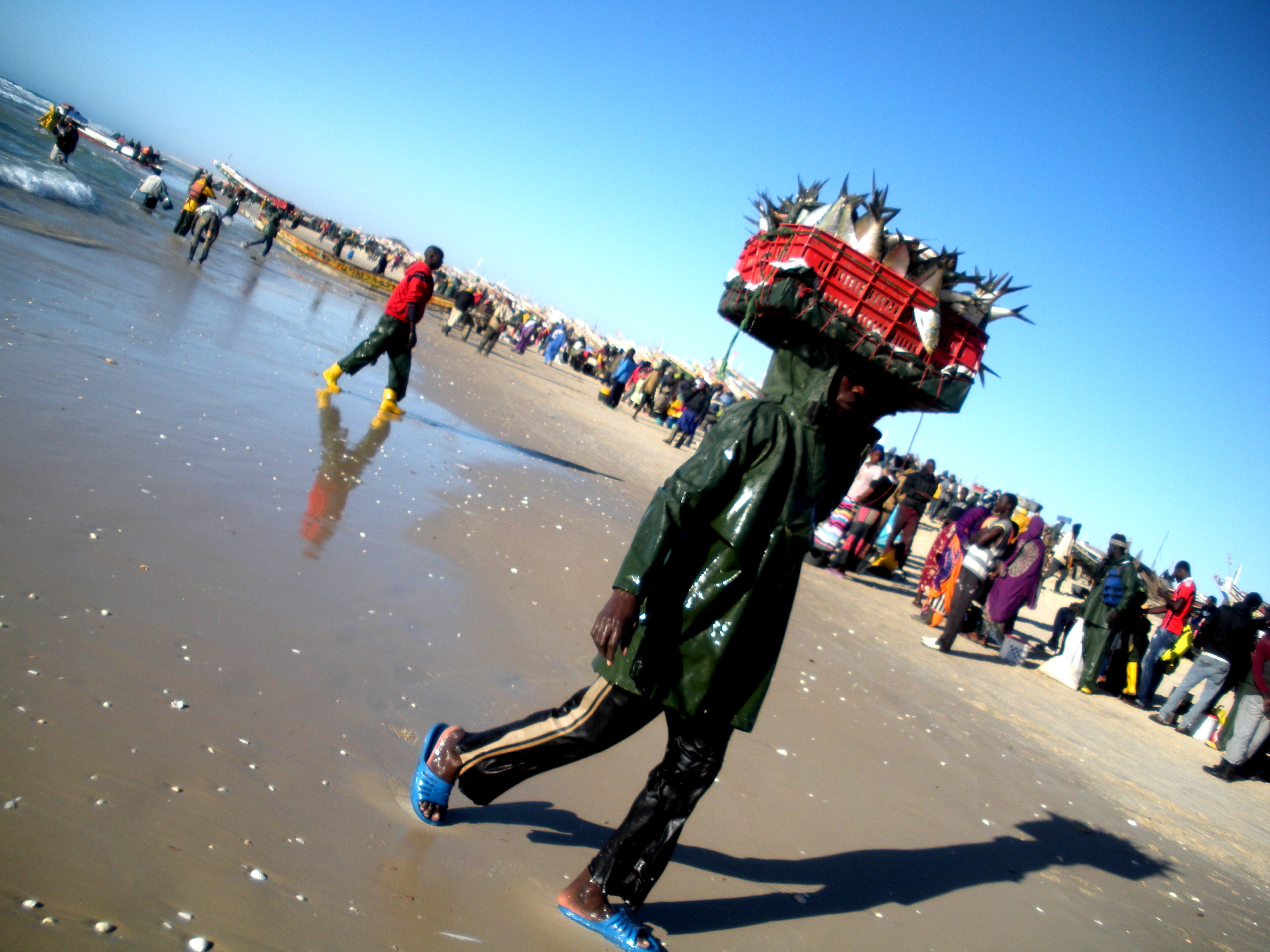 pêcheur portant ses poissons sur la tête sur la plage du port de Nouakchott This is an image of "African people at work" from Mauritania